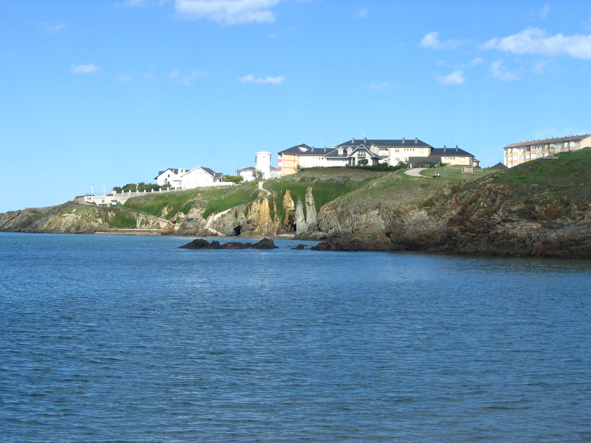 Tapia de Casariego Standpromenade